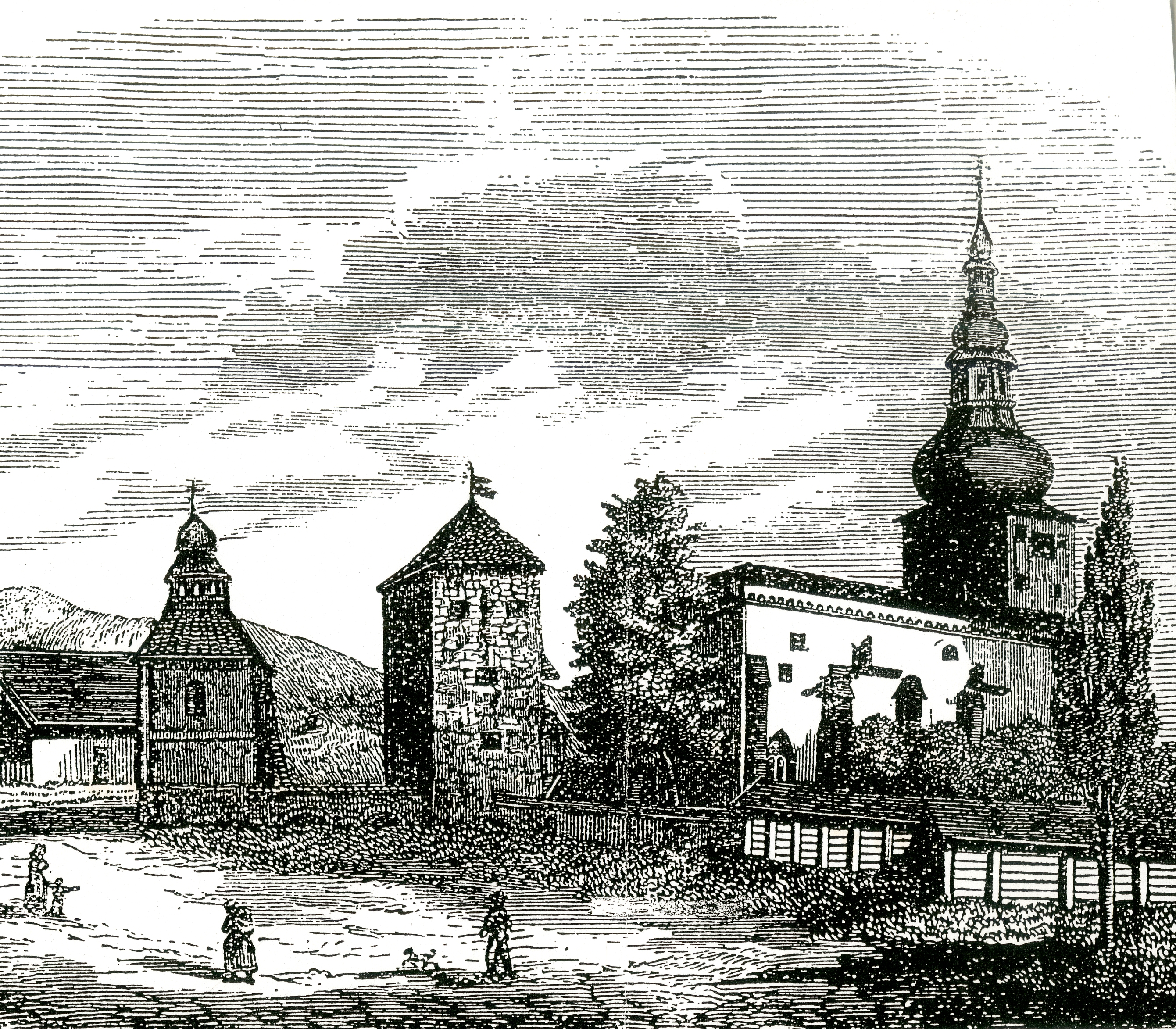 Pukanský mestský hrad v roku 1857